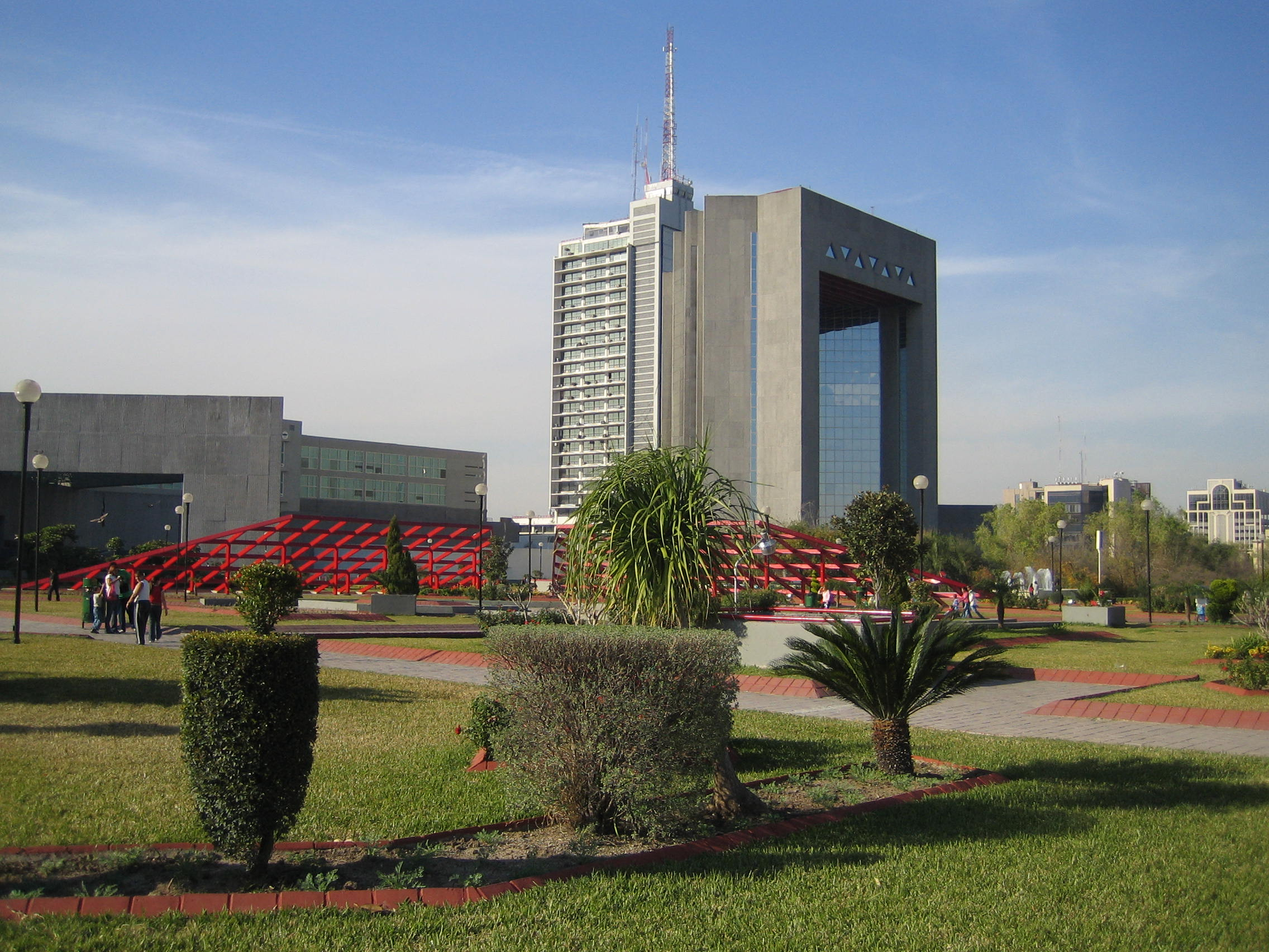 Monterrey: Macroplaza, Edificio Latino, Tribunal de Justicia de Nuevo León.